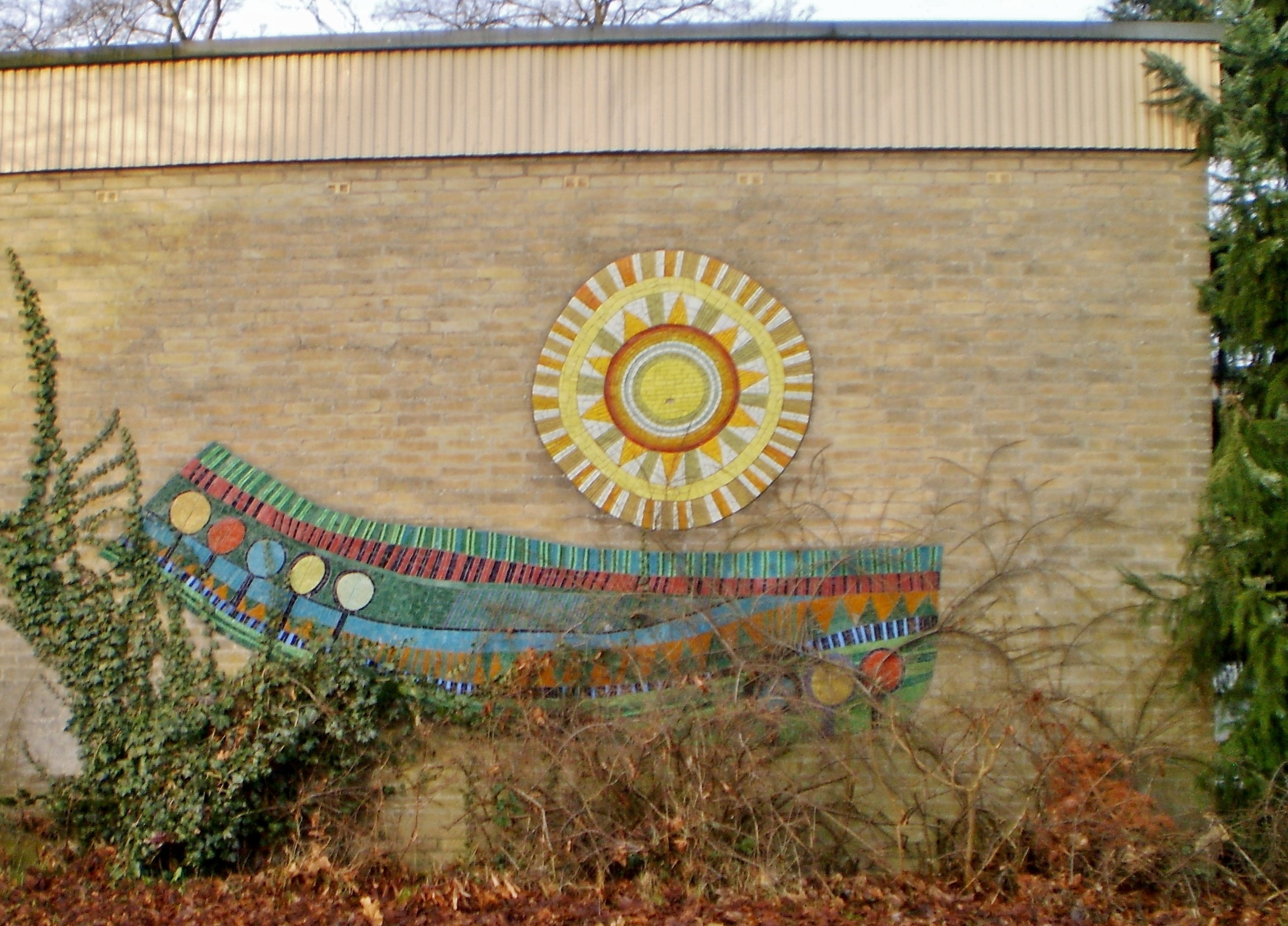 Glasmozaïek van Elly Meijer op de oostelijke gevel van de vroegere kleuterschool Zonneveld aan de Zandvoortweg. Voorstellend veld met bomen en water met daarboven de zon. Genoemd naar de zeventiende eeuwse boerderij Het Zonneveld op deze plek. De nabij staande Gaspard de Colignyschool is als verwijzing naar die boerderij gebouwd in de vorm van twee hooimijten